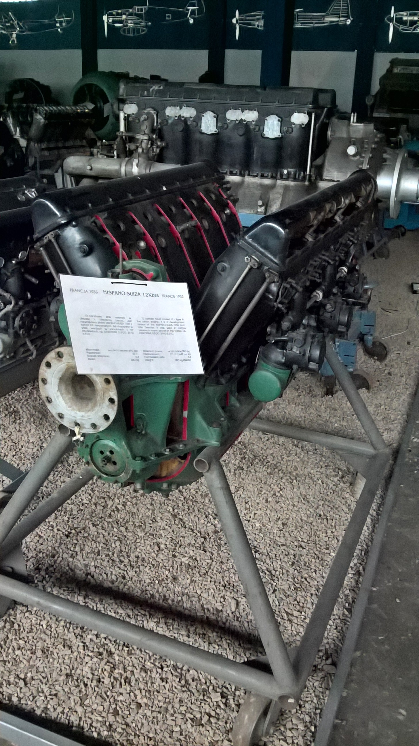 Francuski 12-cylindrowy silnik widlasty Hispano-Suiza 12Xbrs z 1933 r. ze zbiorów Muzeum Lotnictwa Polskiego w Krakowie.